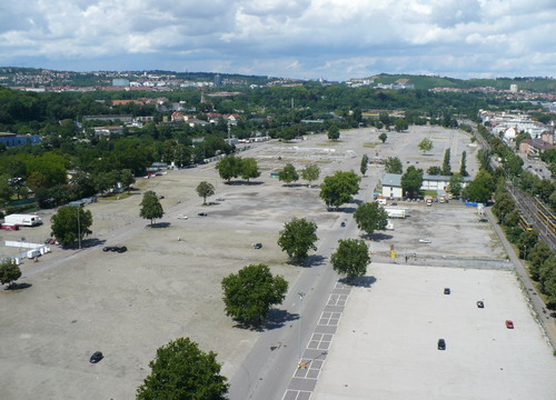 Leerer Cannstatter Wasen in Stuttgart